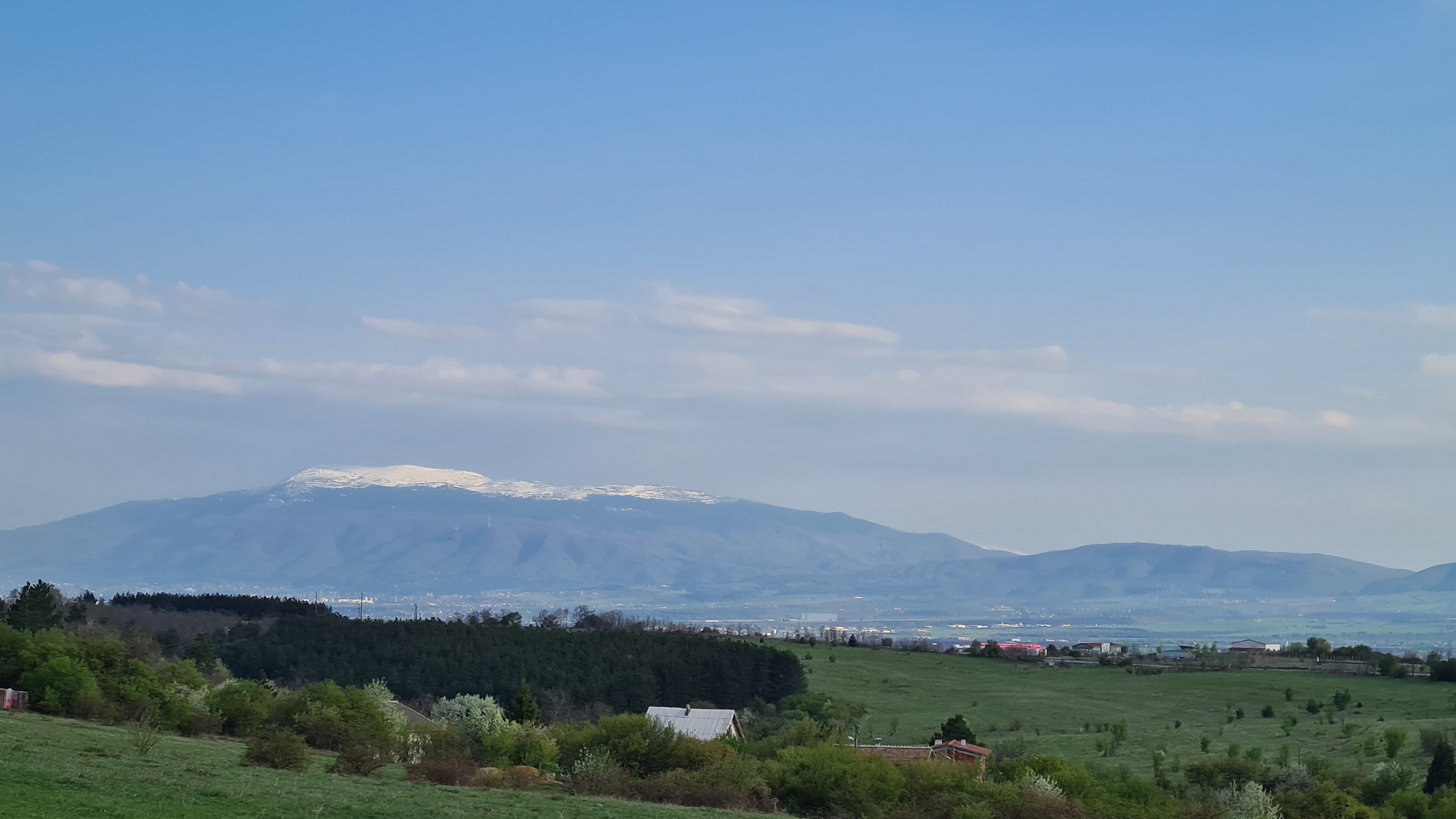 Планина